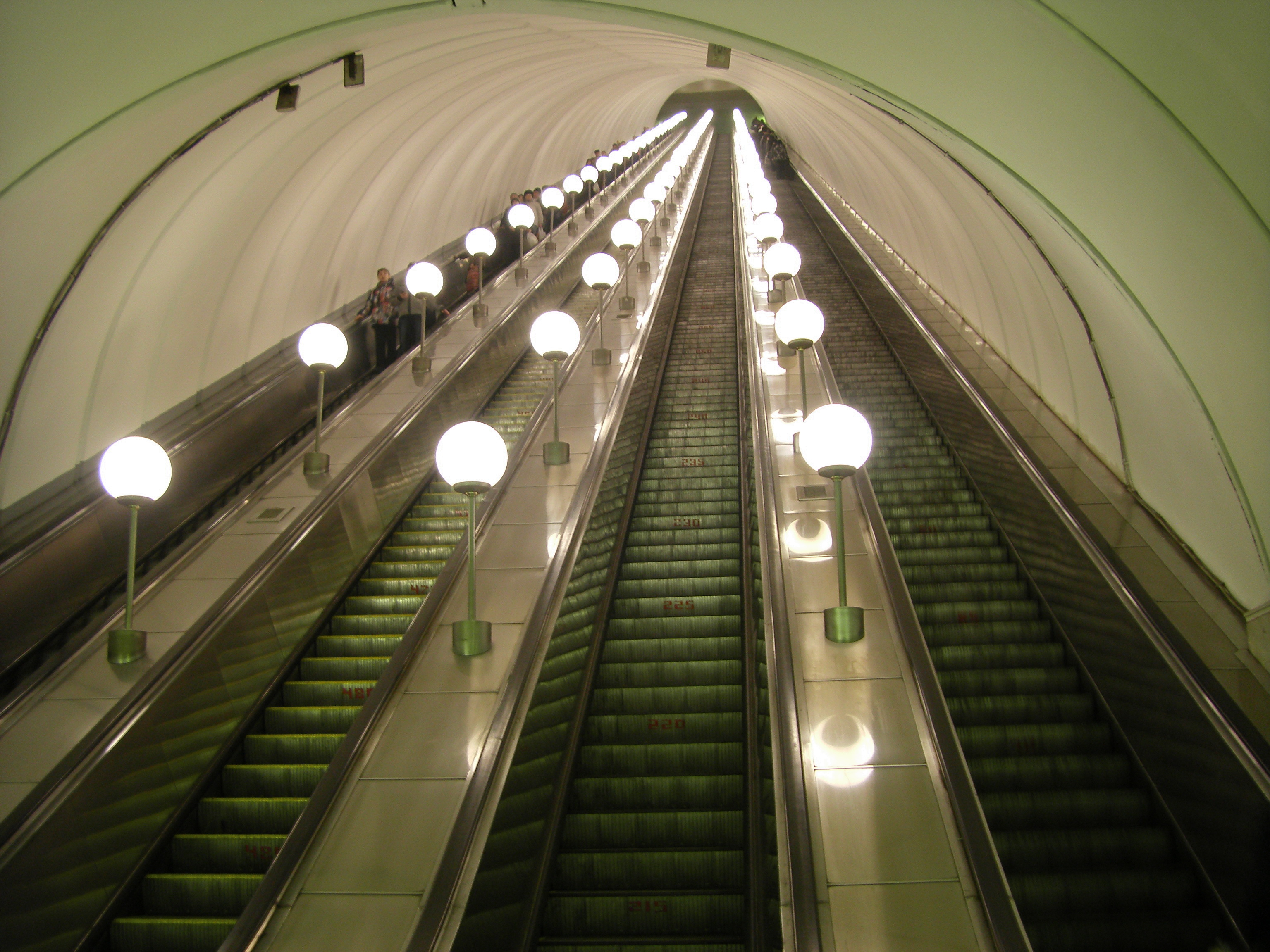 Эскалаторы на станции метро "Дубровка"